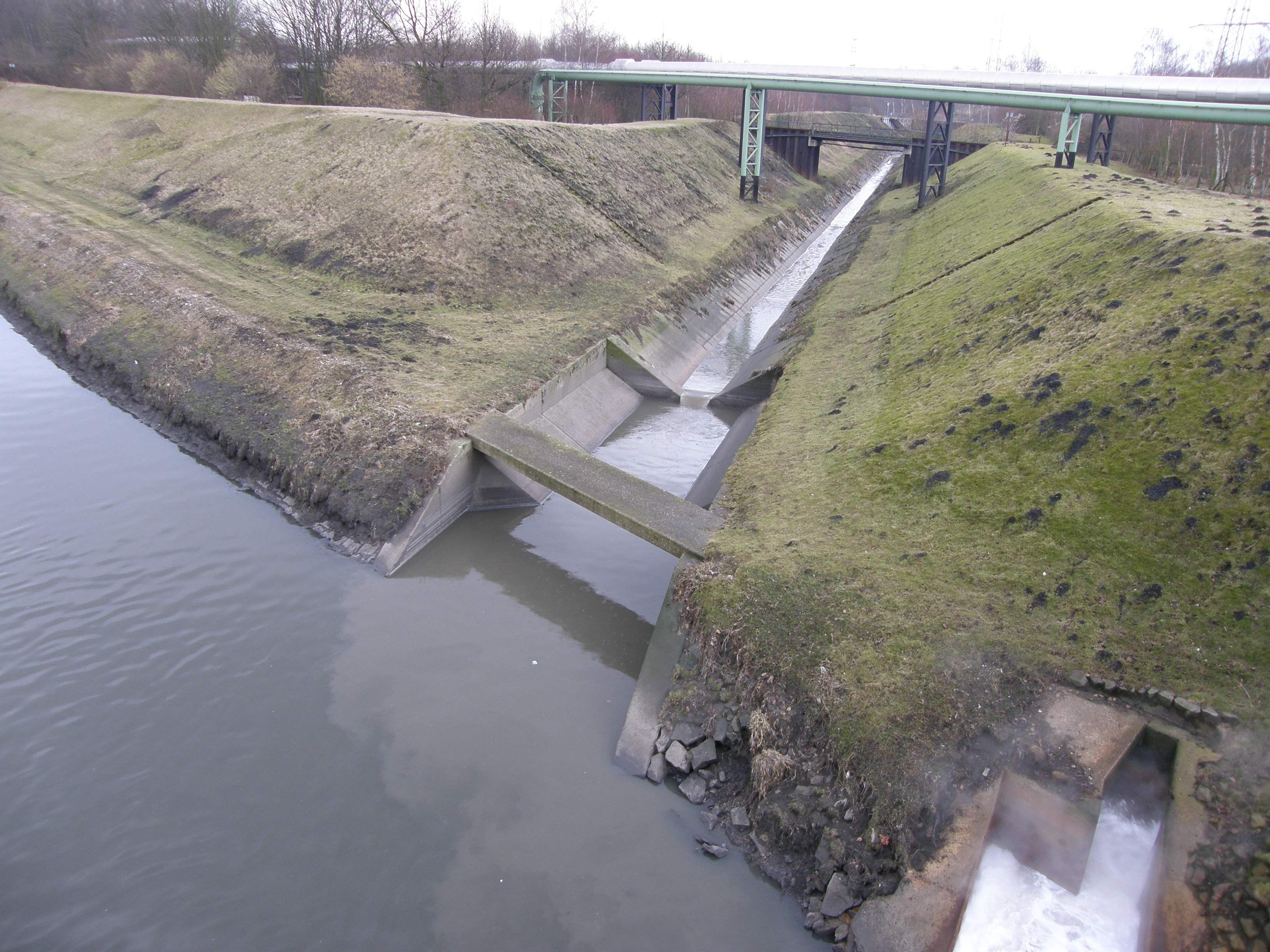 Mündung des kanalisierten Scharzbachs in die Emscher, Gelsenkirchen (an der Stadtgrenze zu Essen)